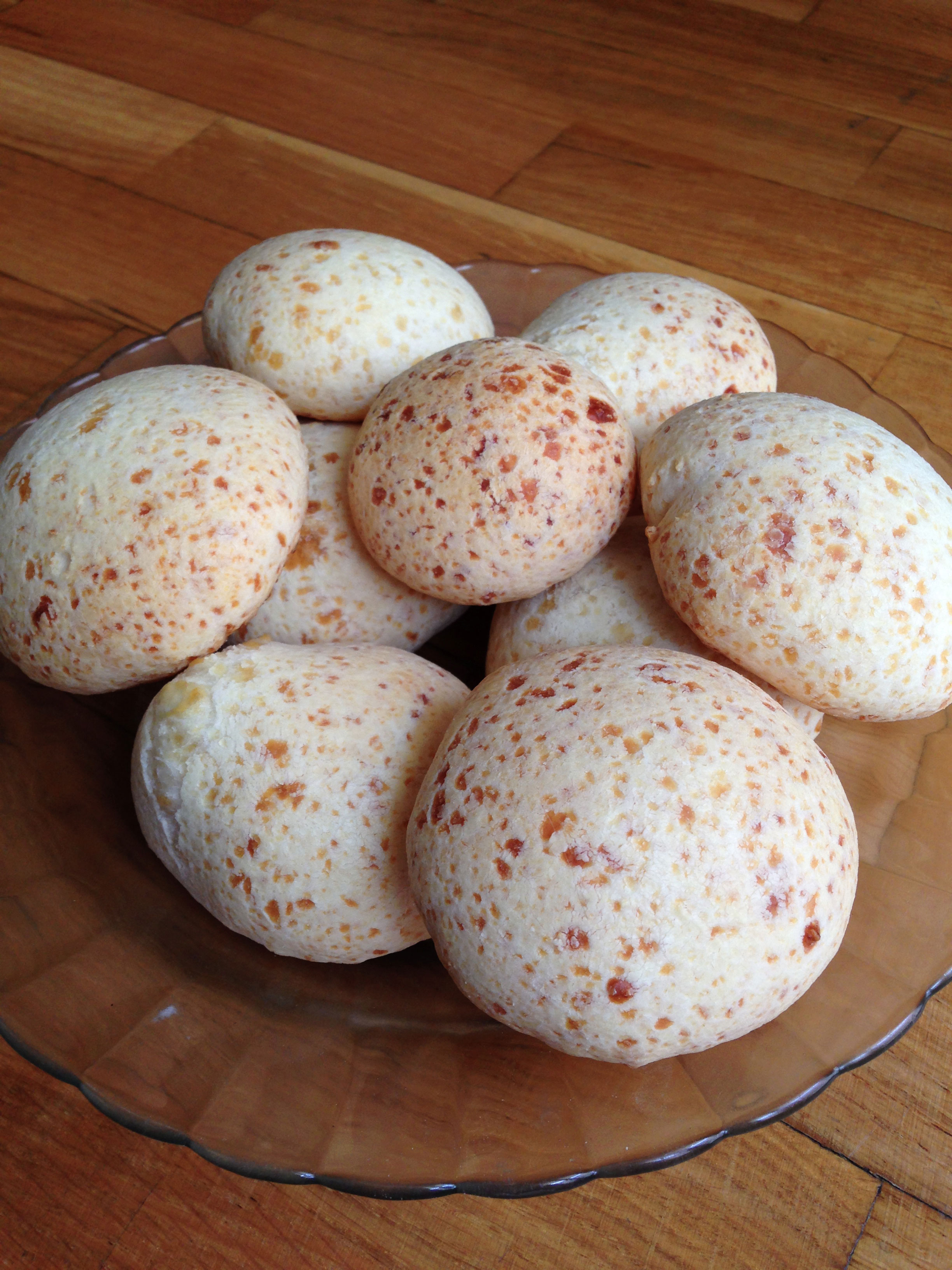 Cuñapé